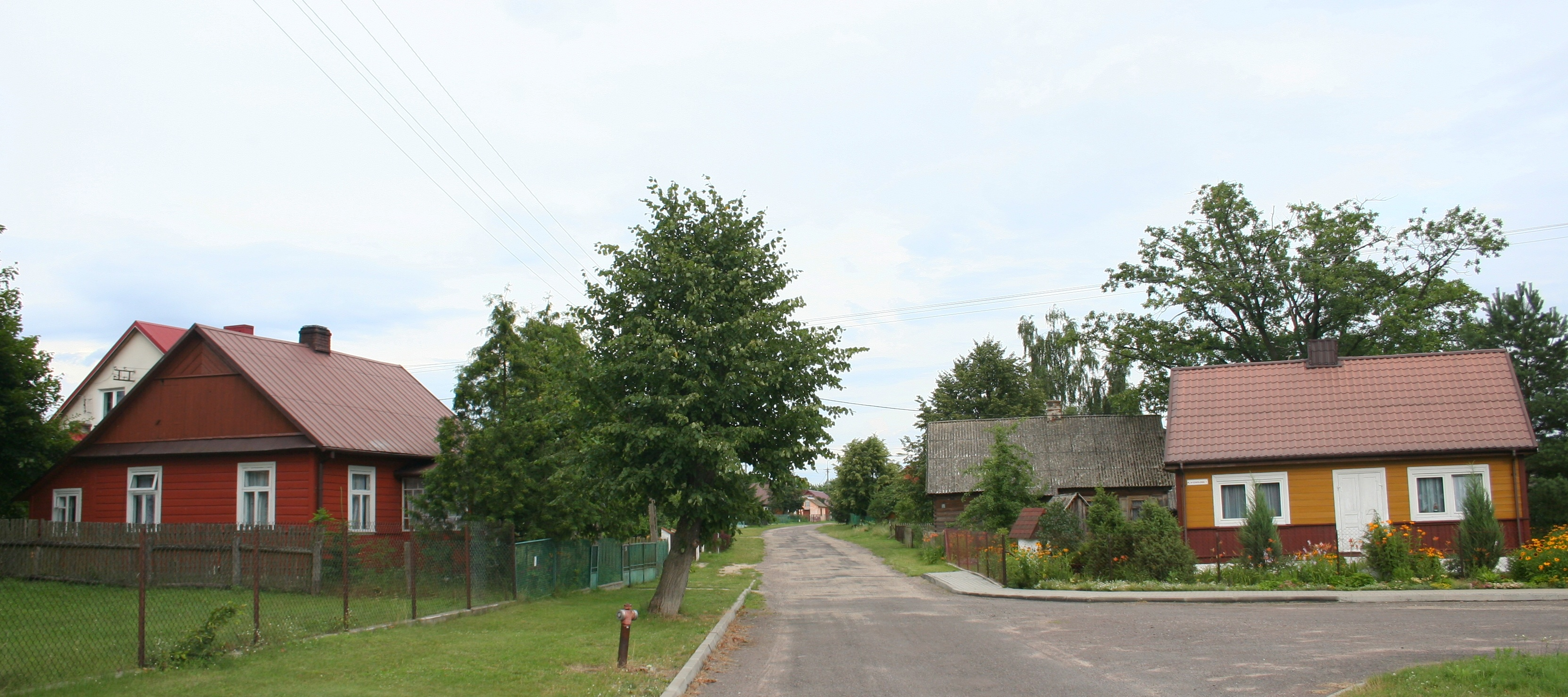 Fragment miejscowości Niemirów, gmina Mielnik, woj. podlaskie.